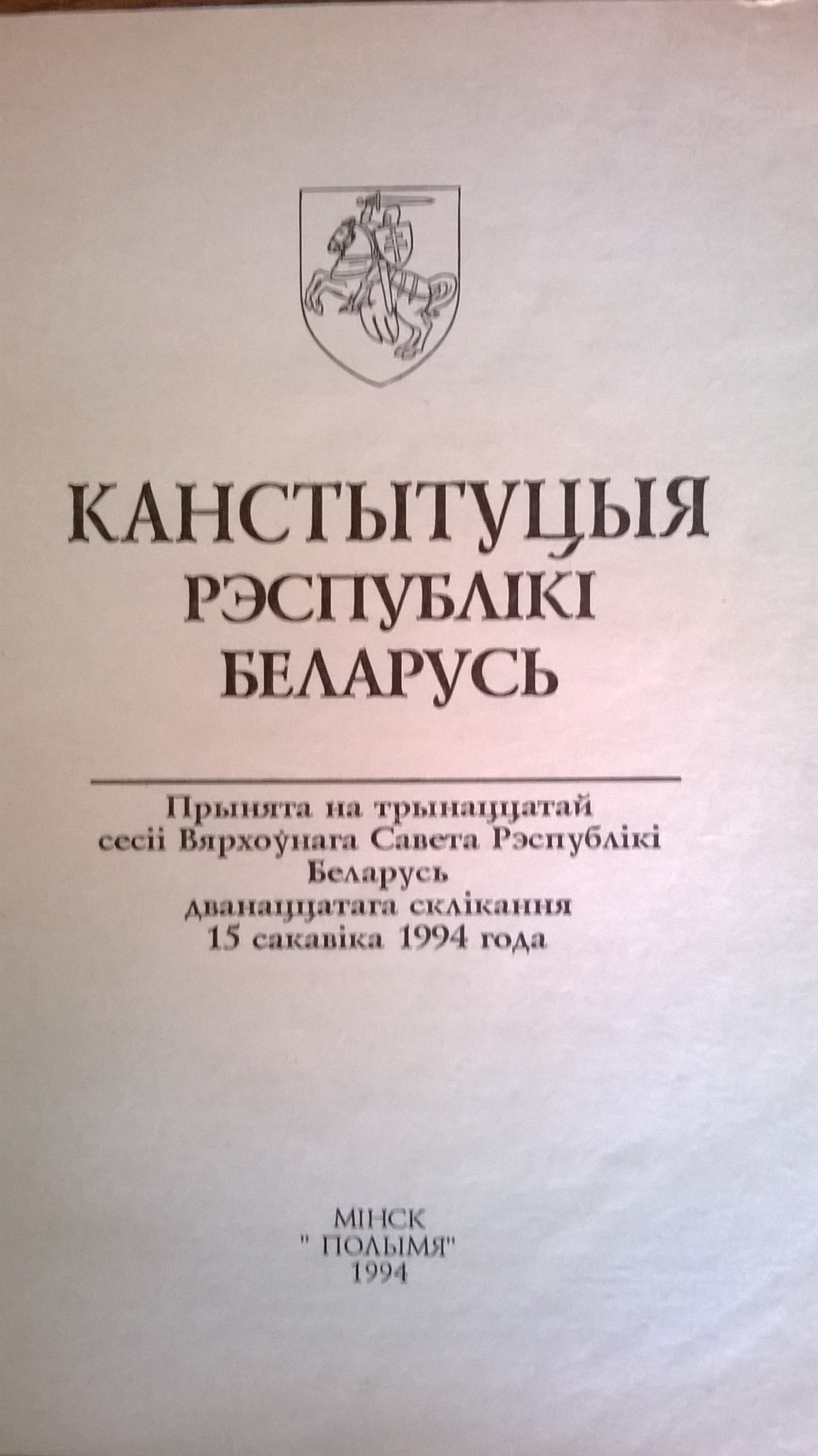 Беларуская (тарашкевіца): Тытульны ліст Канстытуцыі Рэспублікі Беларусь 1994 года